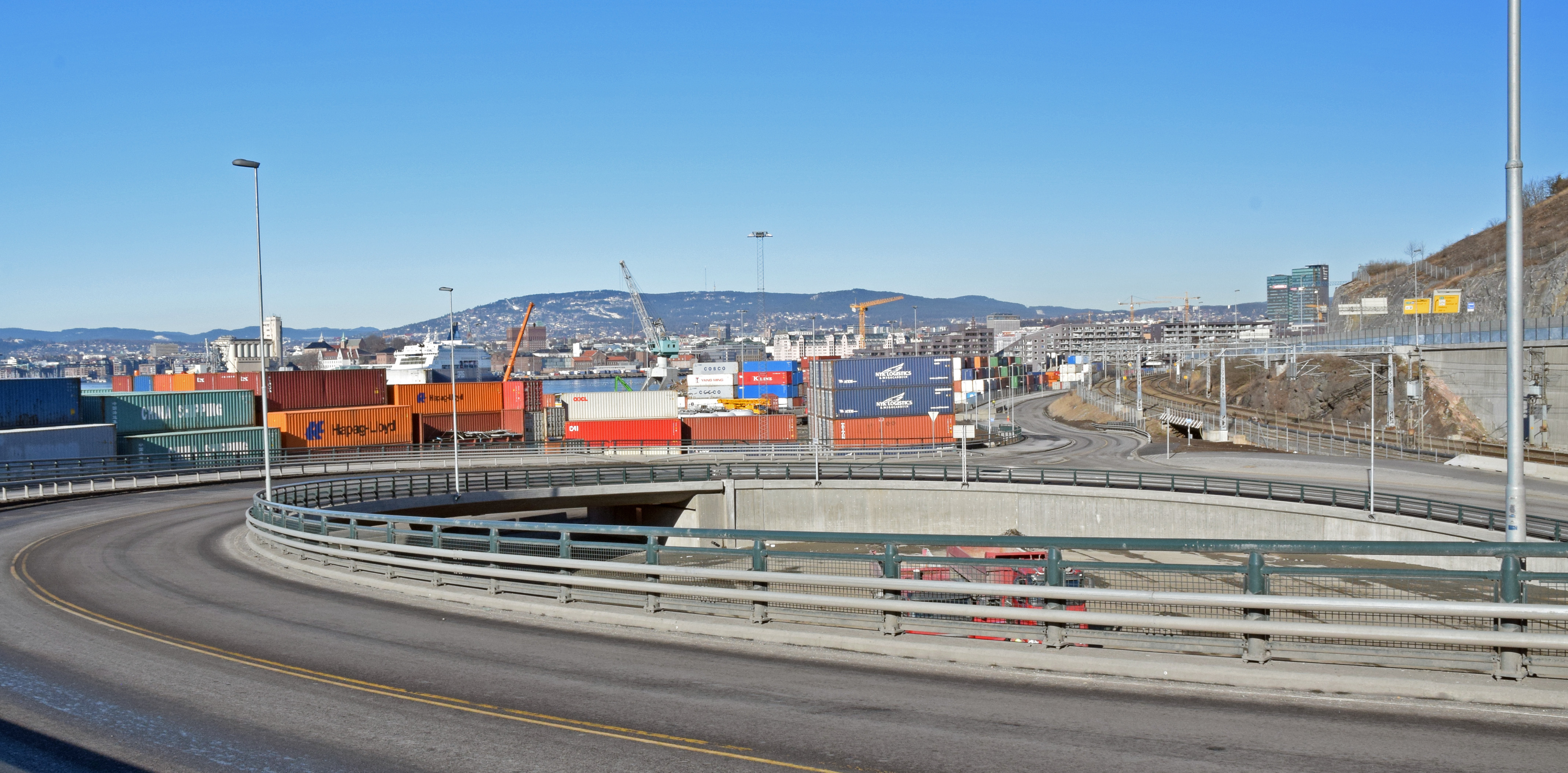 Kongshavn, Oslo. Kontainerhavna sett fra veien fra E18 ned i Sydhavna